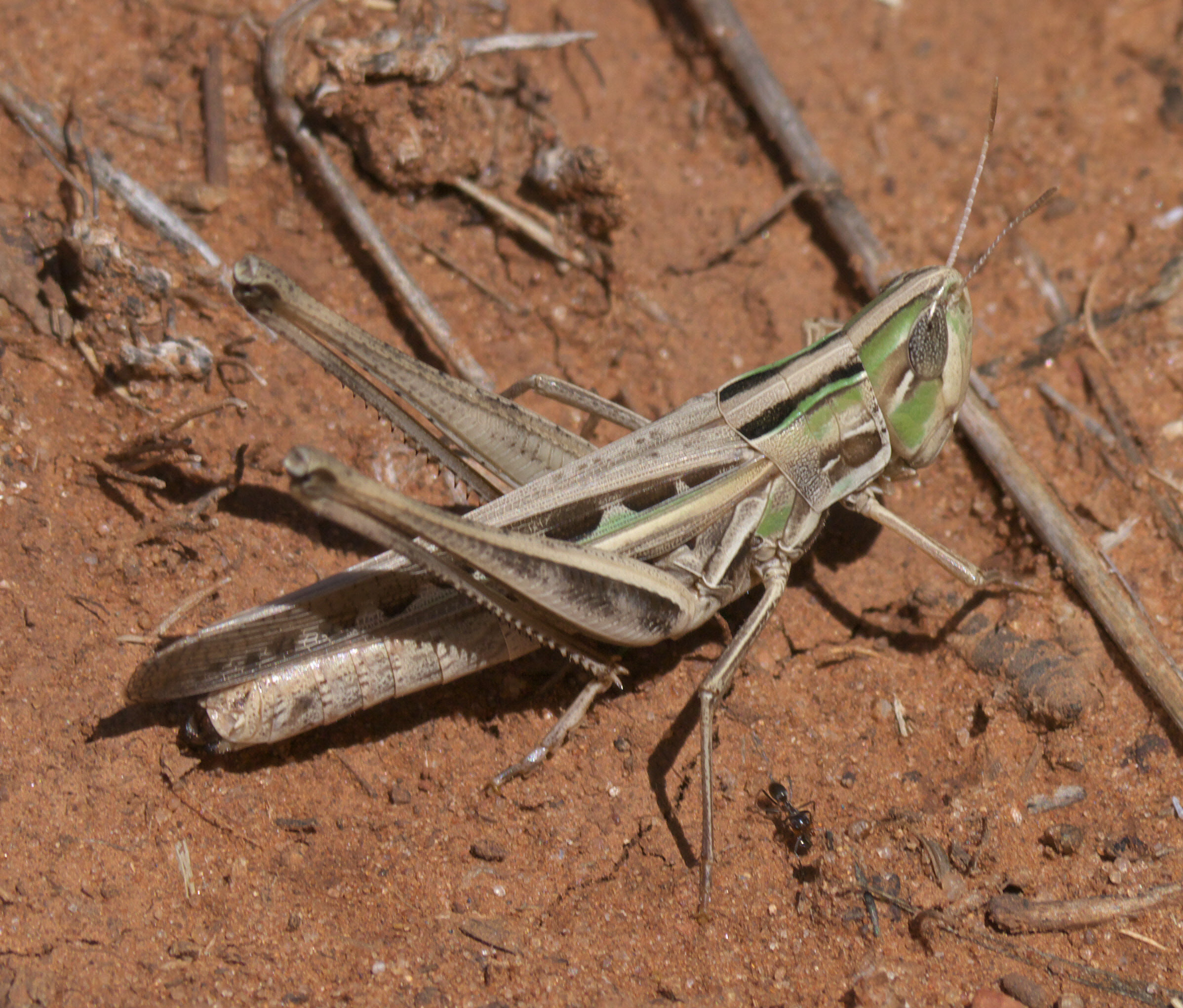 Syrbula admirabilis, Admirable Grasshopper, female, ID Confidence: 87